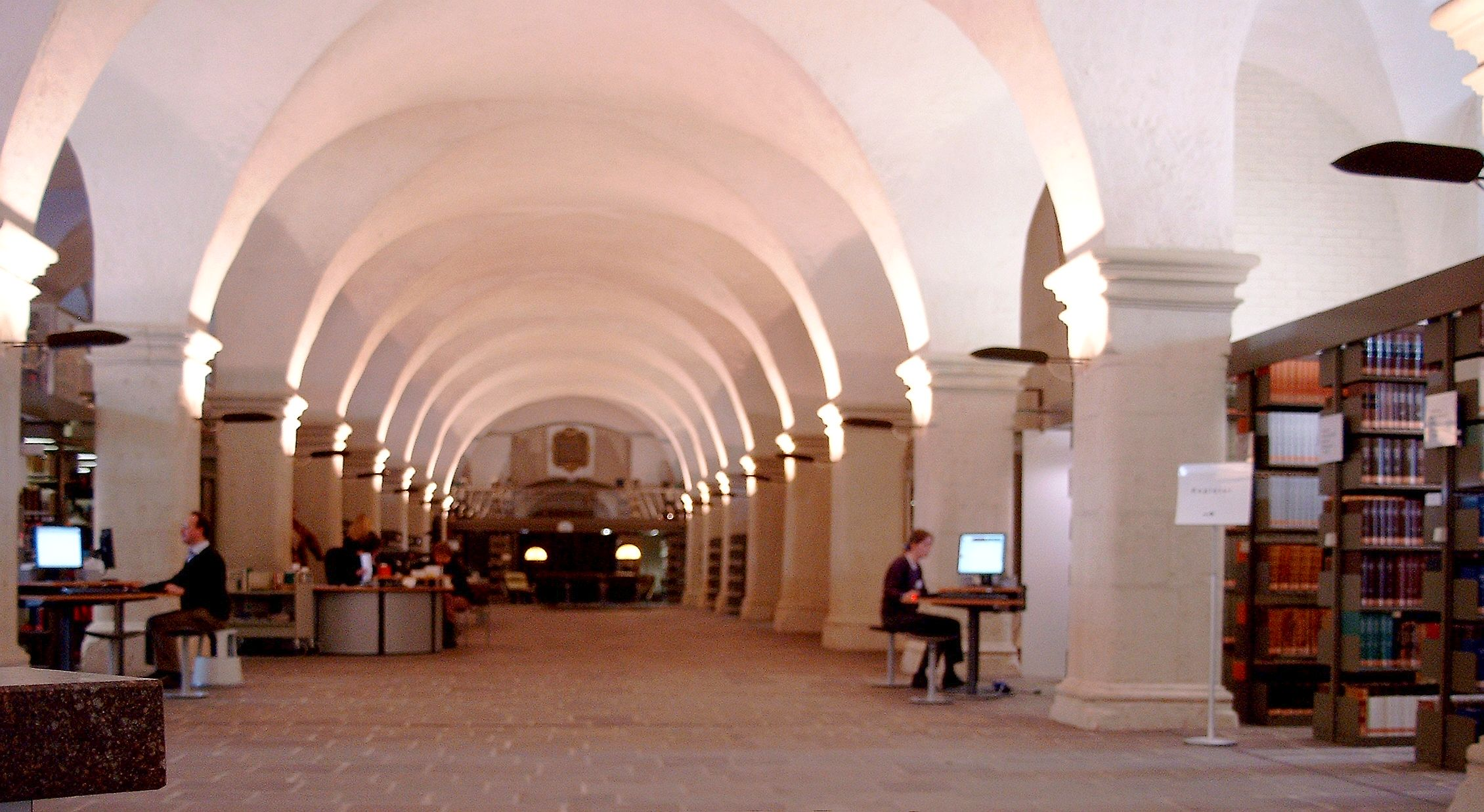 Halle im Erdgeschoss des Zeughauses in Wolfenbüttel. Das Zeughaus ist ein Gebäude des Bibliothekquartiers der Herzog August Bibliothek Wolfenbüttel (HAB) und wird für einen Teil der HAB genutzt.